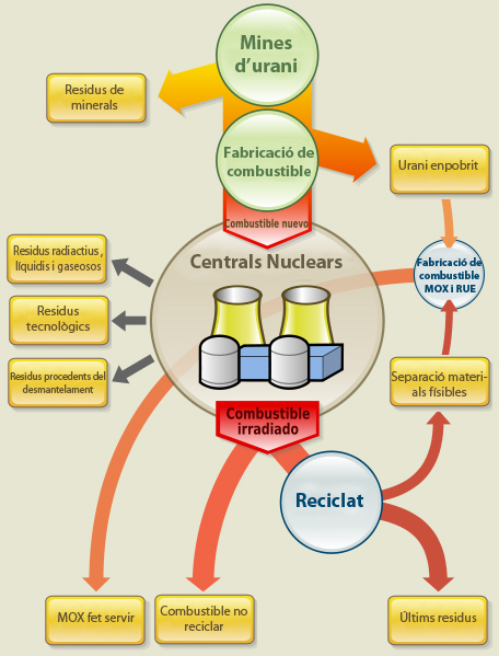 Esquema tractament residus reactius